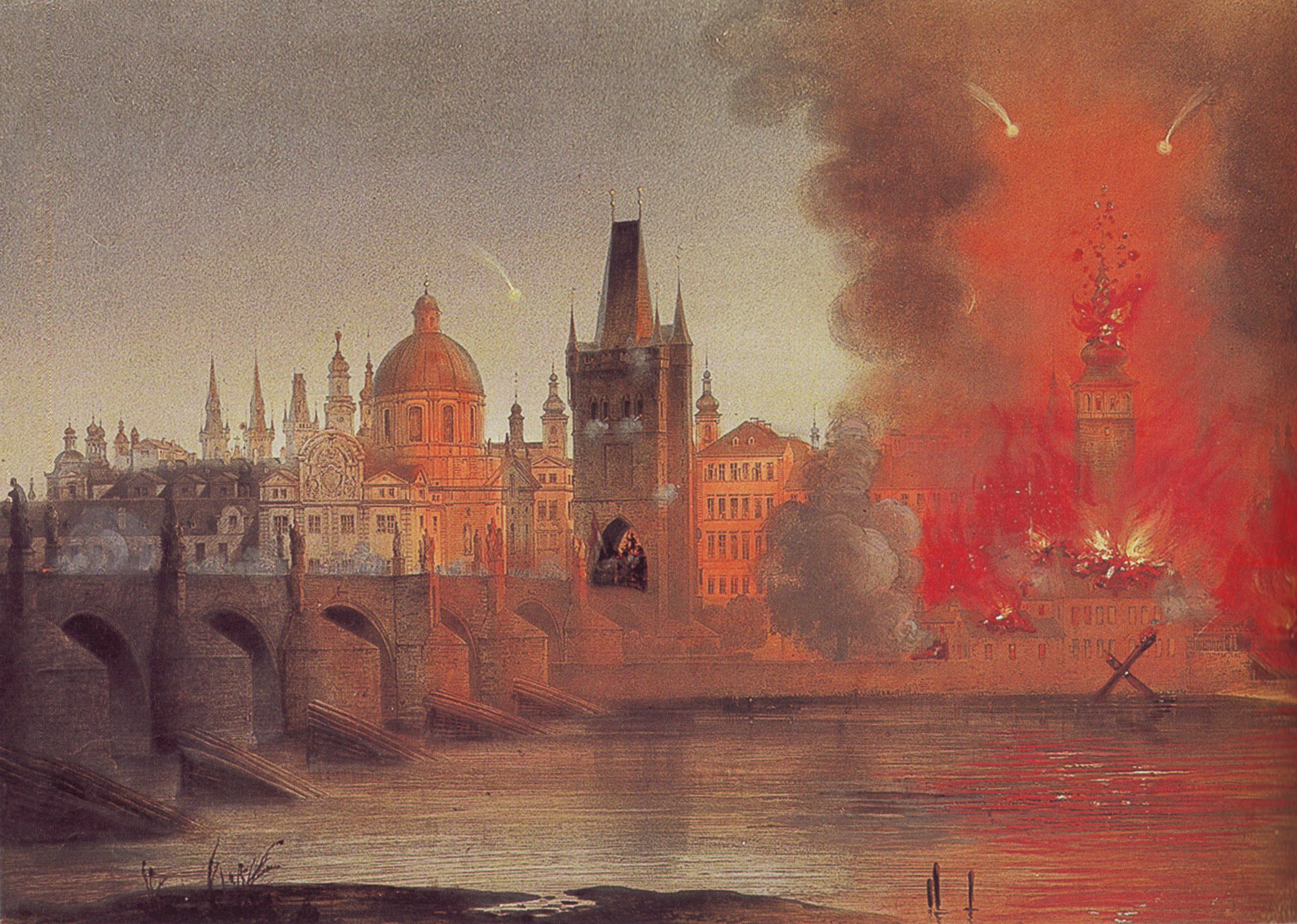 Kolorierte Lithographie. Um 1848. “Windischgrätz bombardiert Prag im Juni 1848”